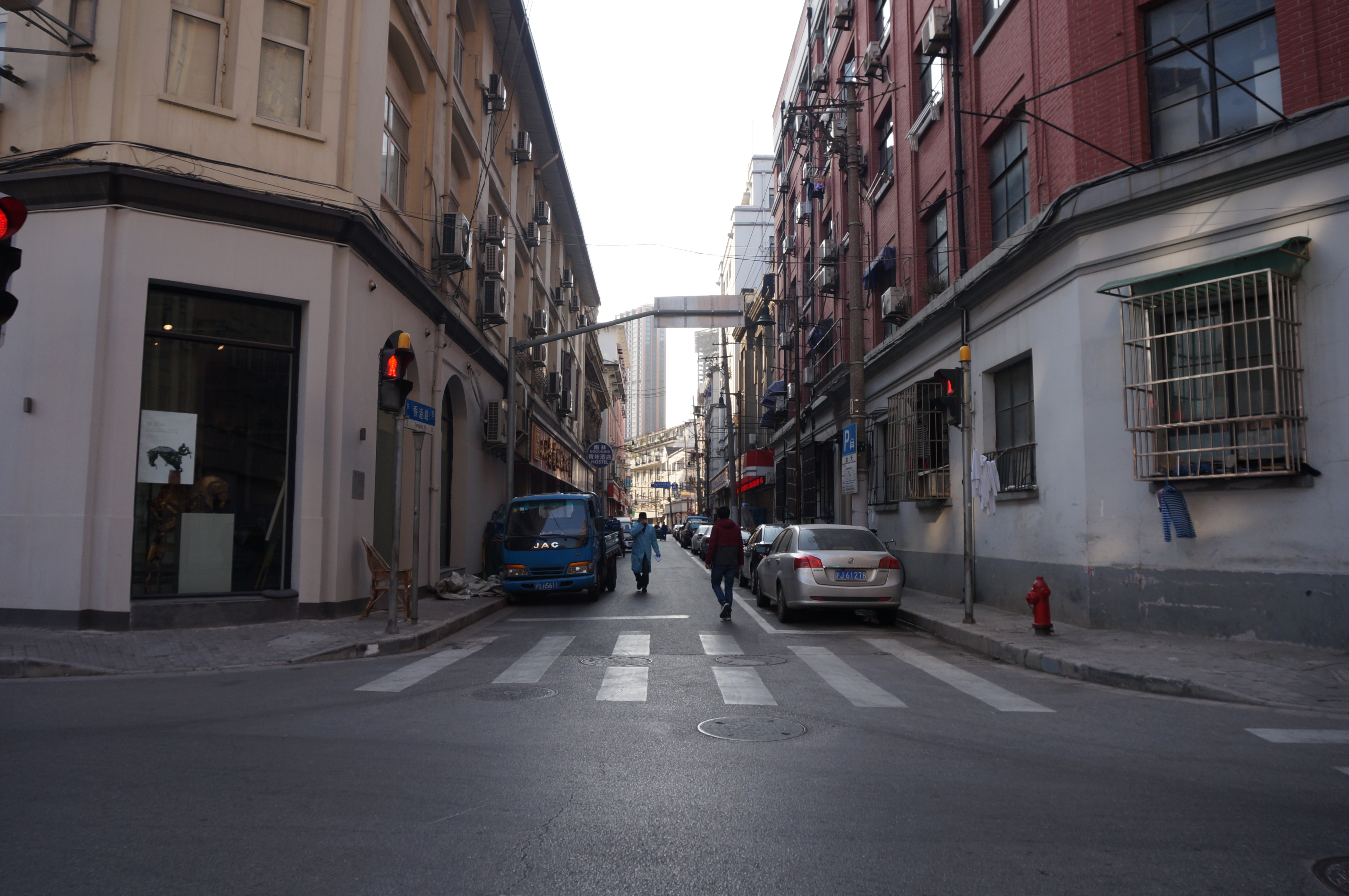 上海香港路街景